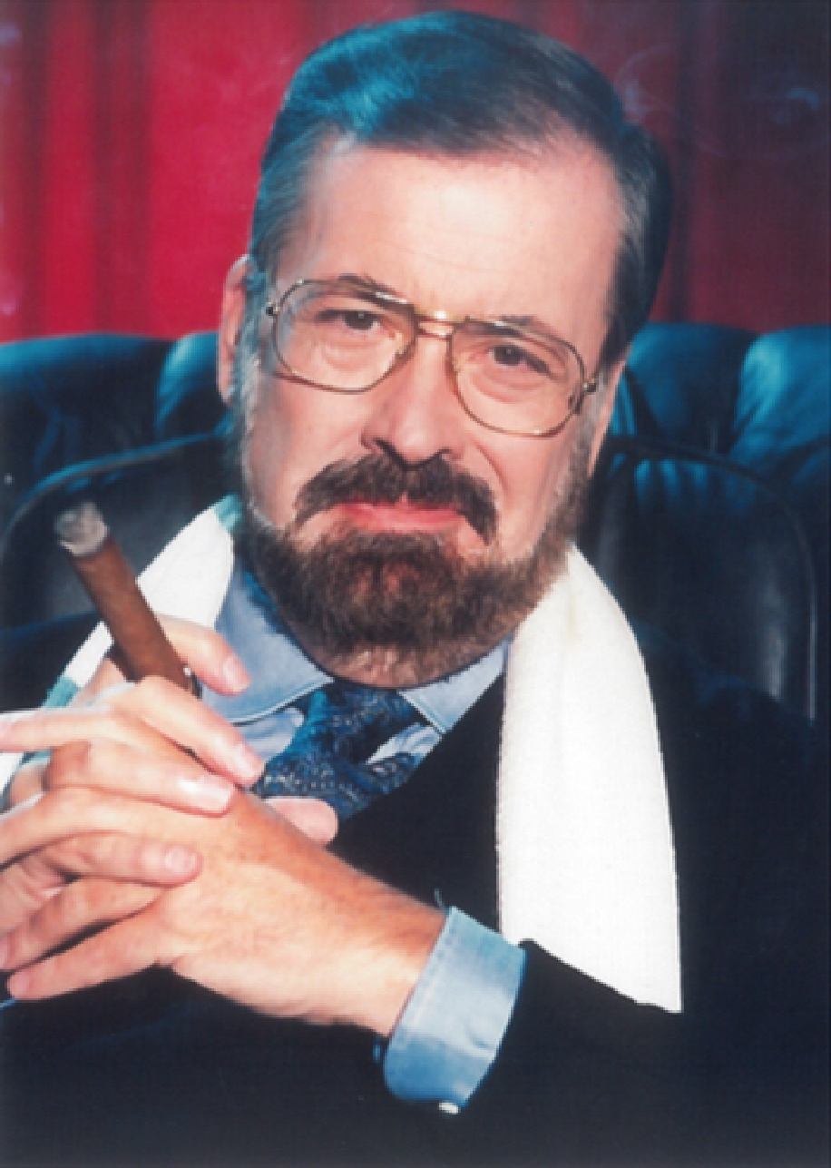 Foto Narciso Ibañez Serrador